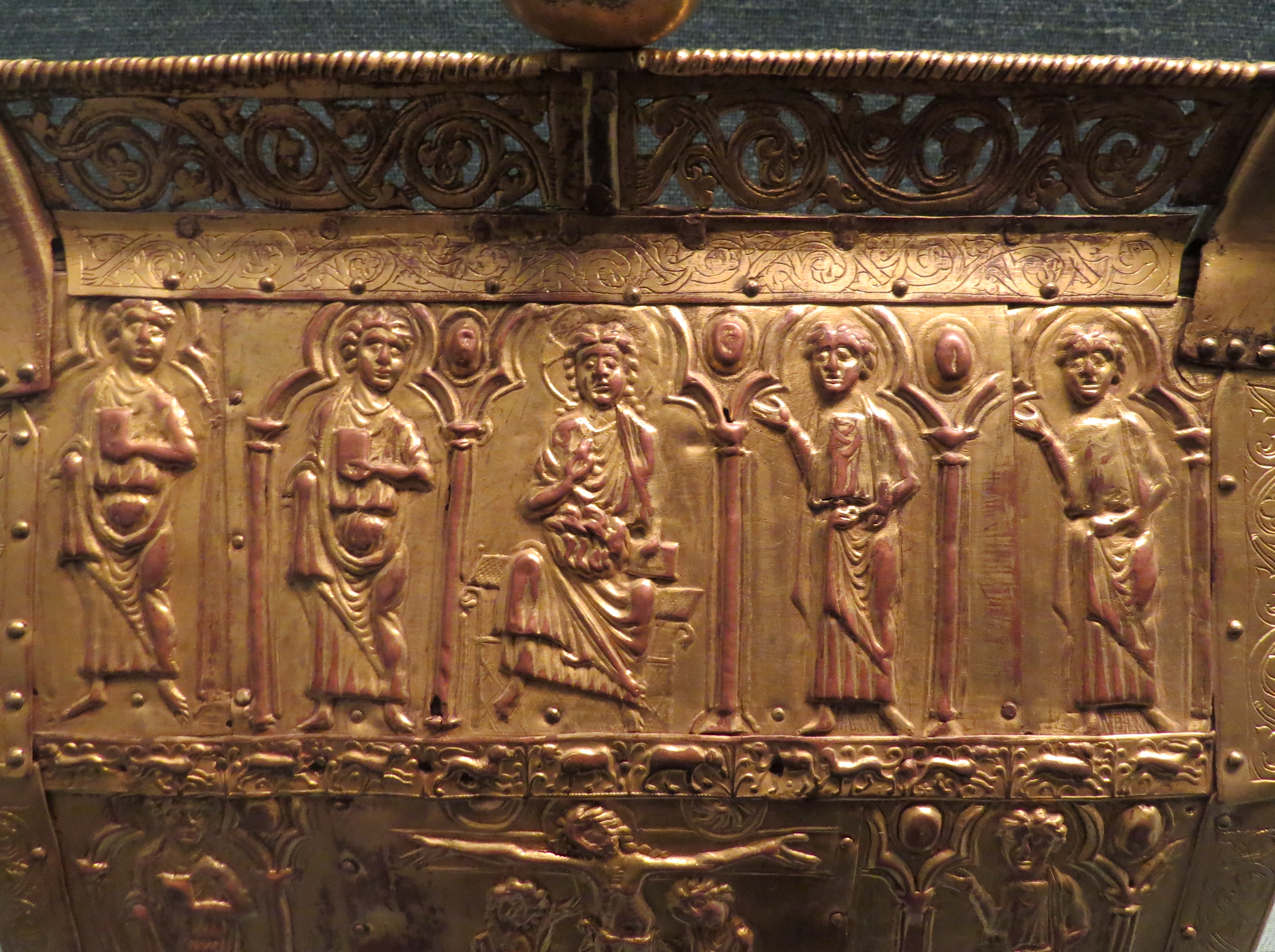 Detalje fra Vatnåsskrinet, ca. 1250-1300, oprindeligt fra Vatnås Kirke i Norge, Nationalmuséet i København